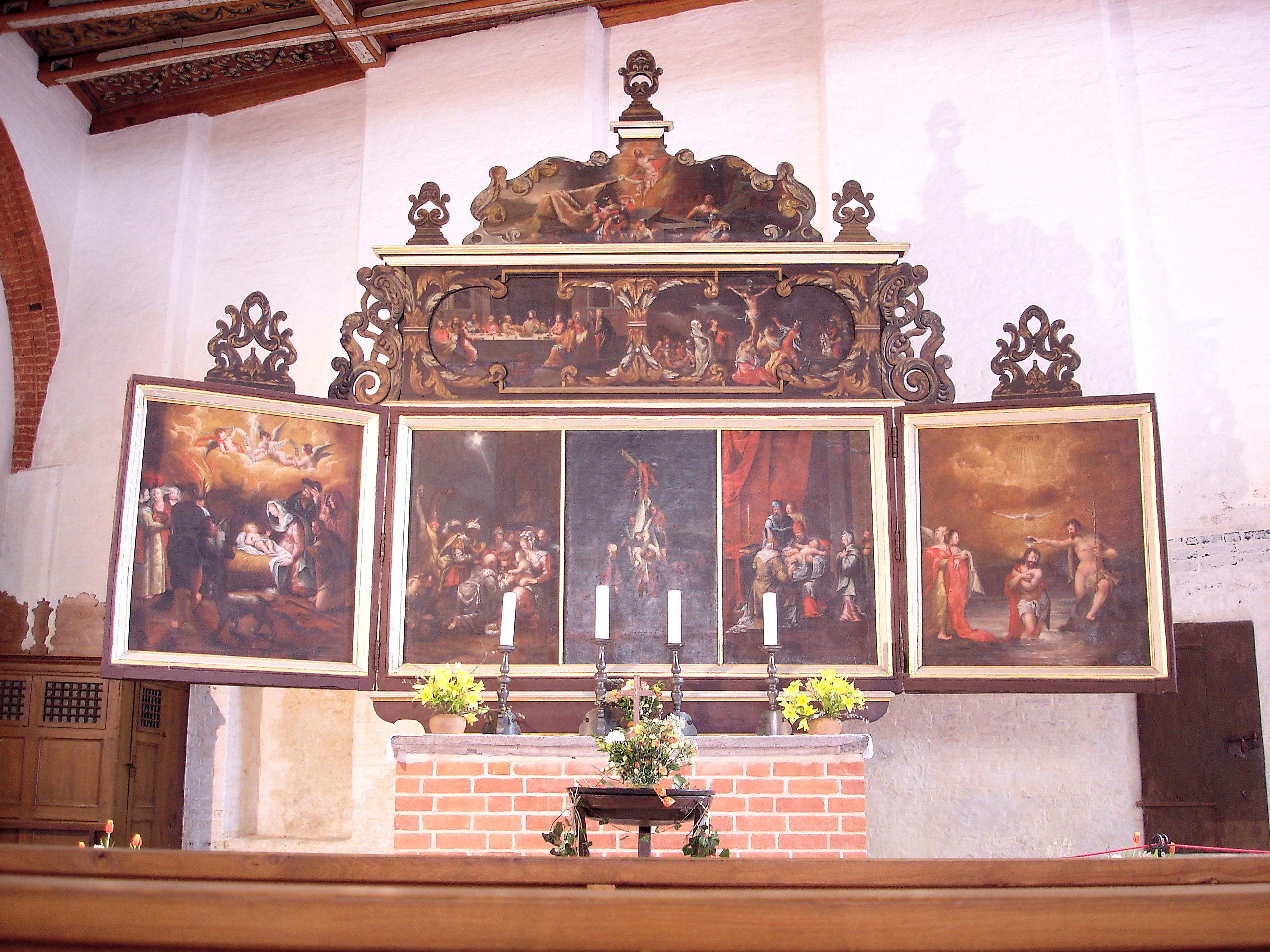 Altar der Heiligen-Geist-Kirche Wismar, Mecklenburg-Vorpommern